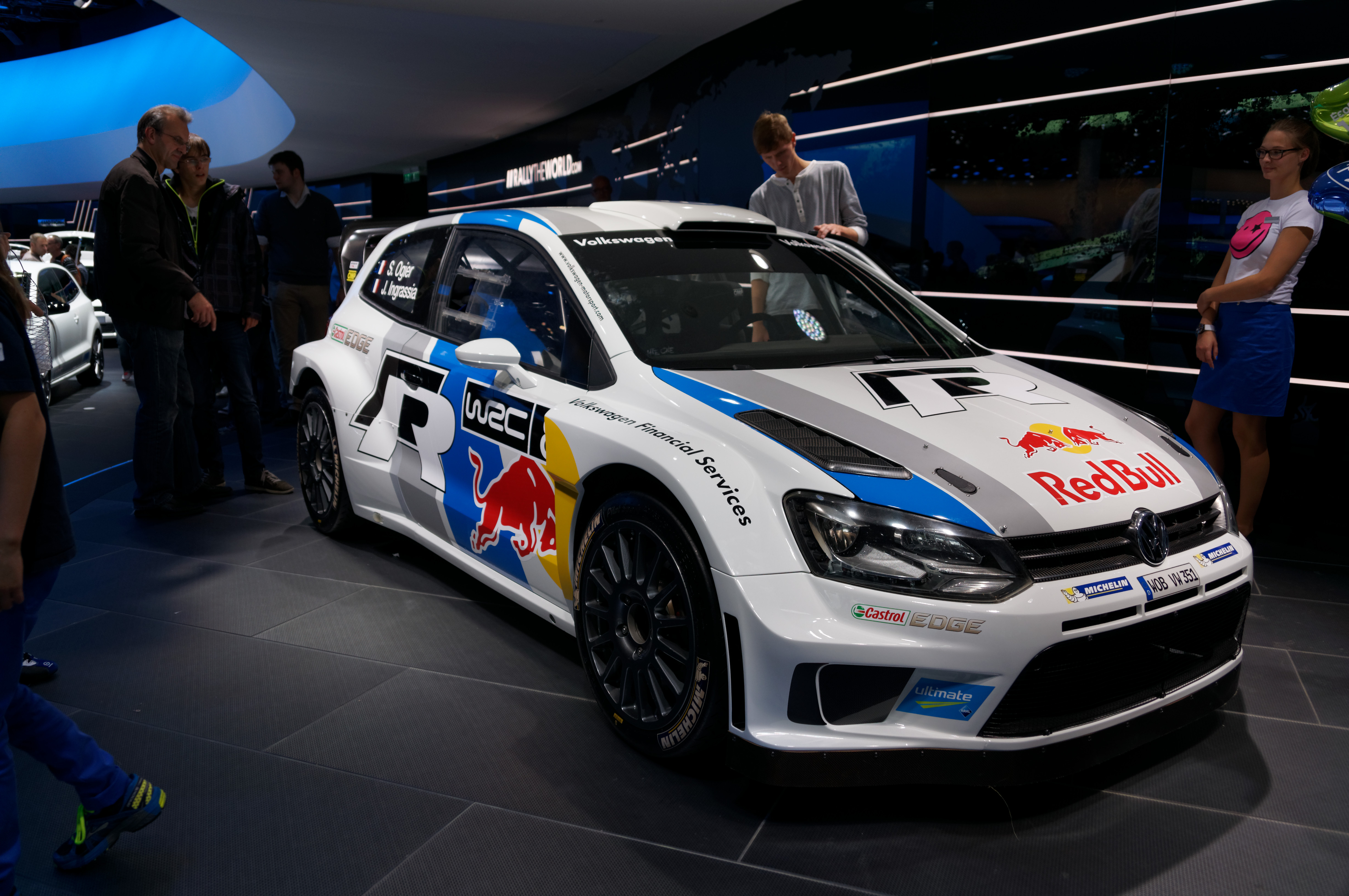 DSC01951_DxO